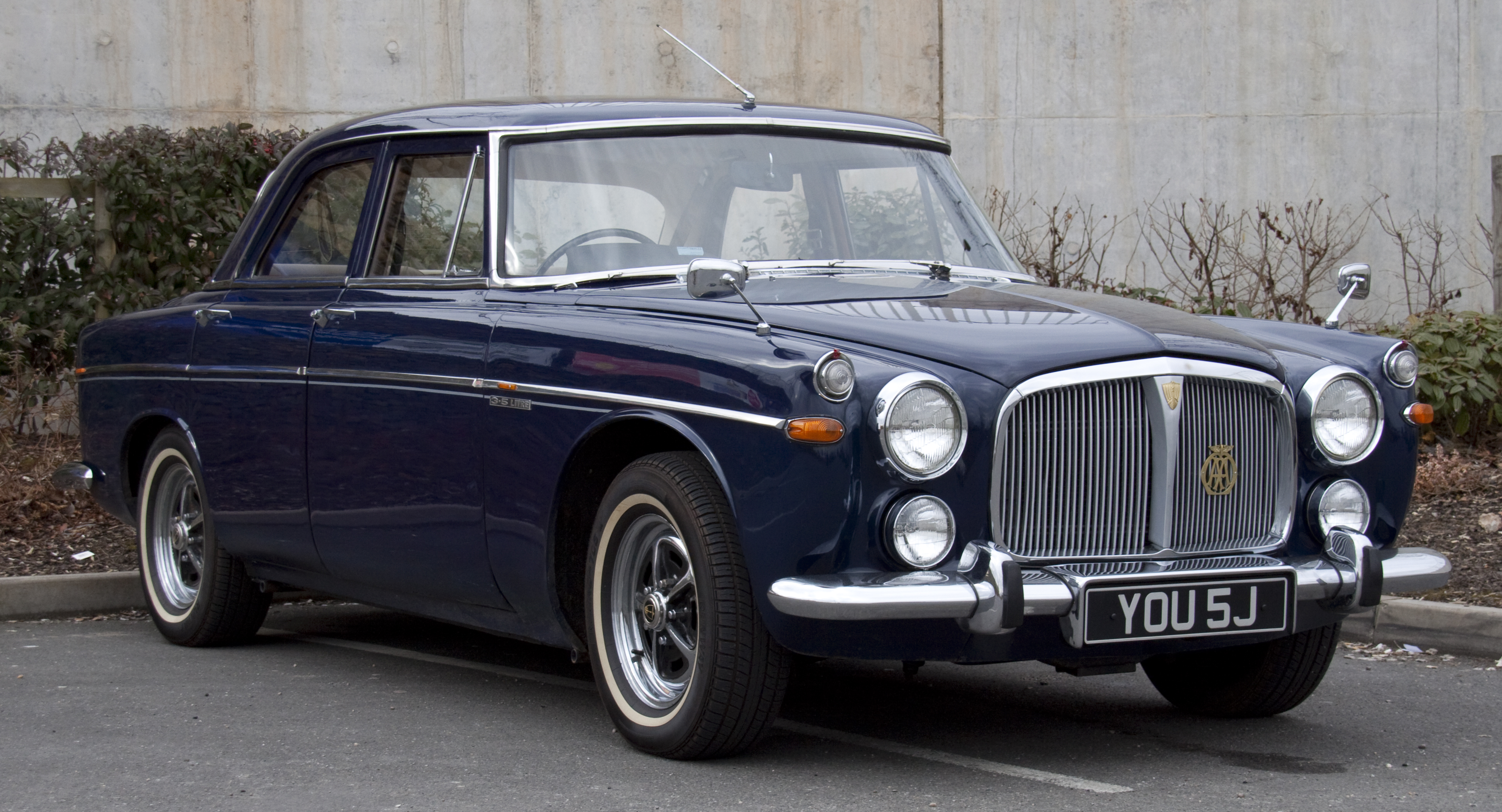 Rover P5 3.5litre